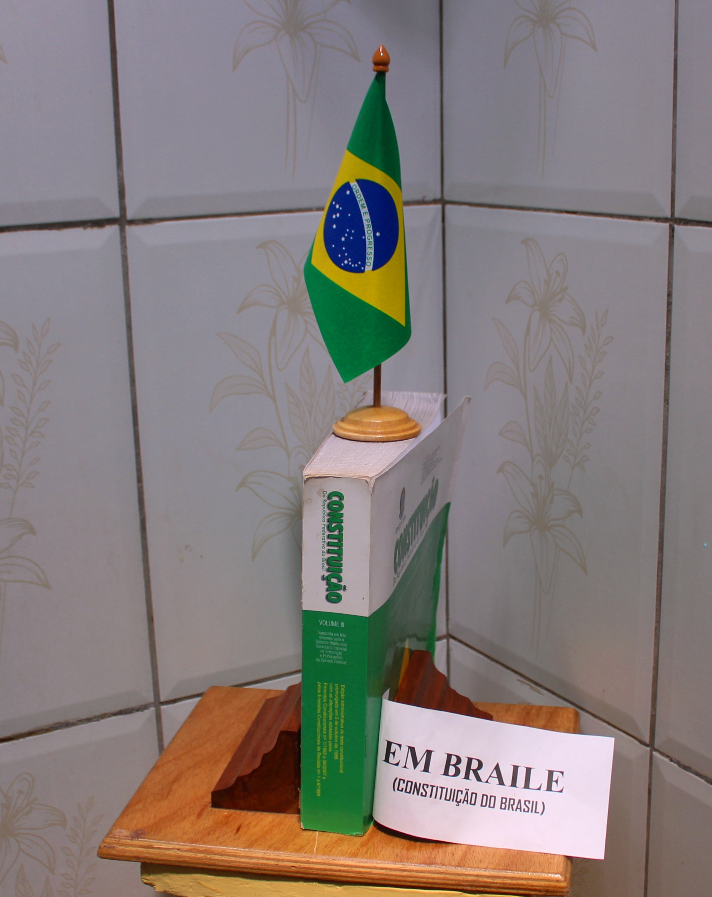 Expositor com um volume da Constituição do Brasil no sistema Braile. Exemplar publicado pelo Senado Federal do Brasil.